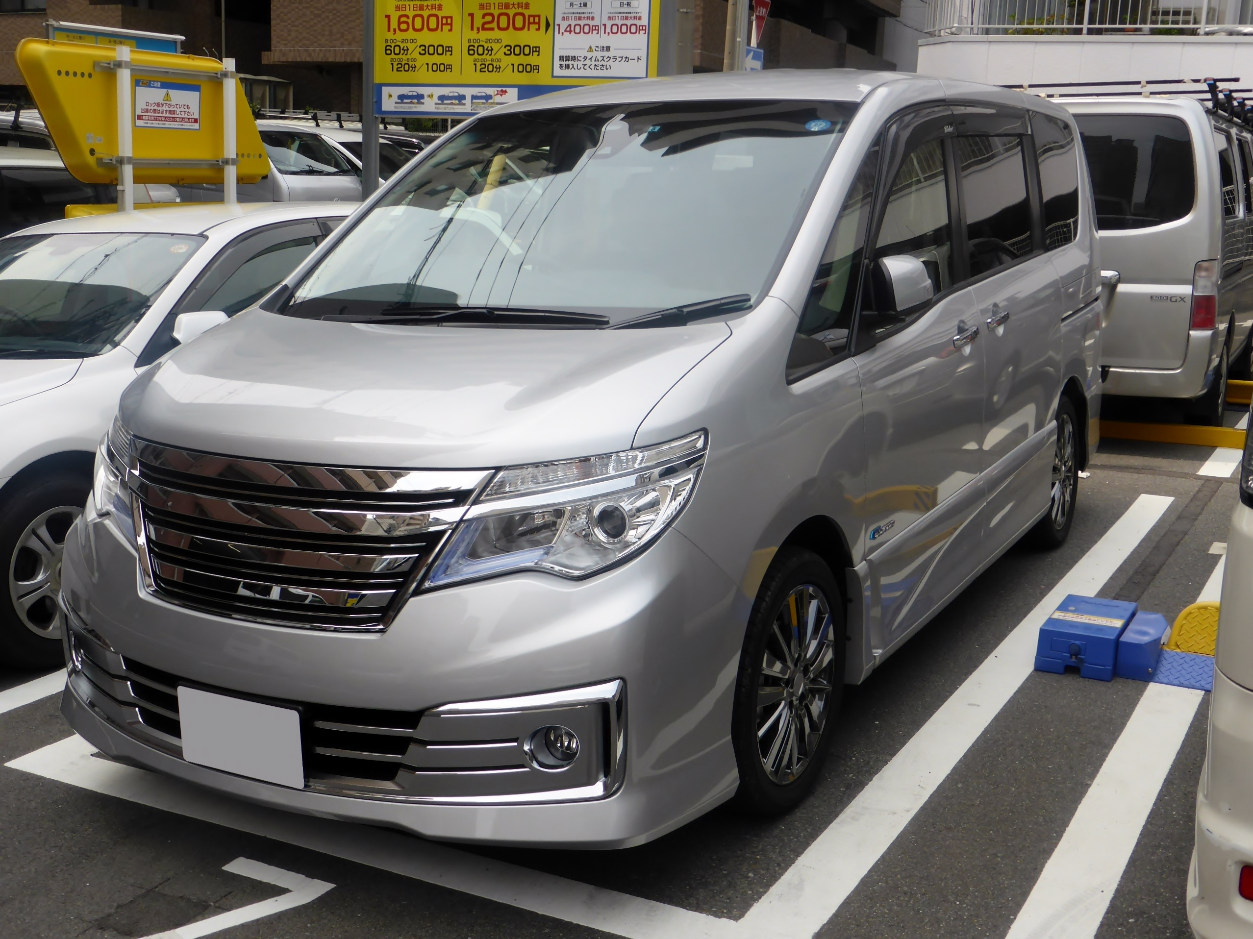 C26型日産・セレナライダーS-ハイブリッドをフロントから撮影。